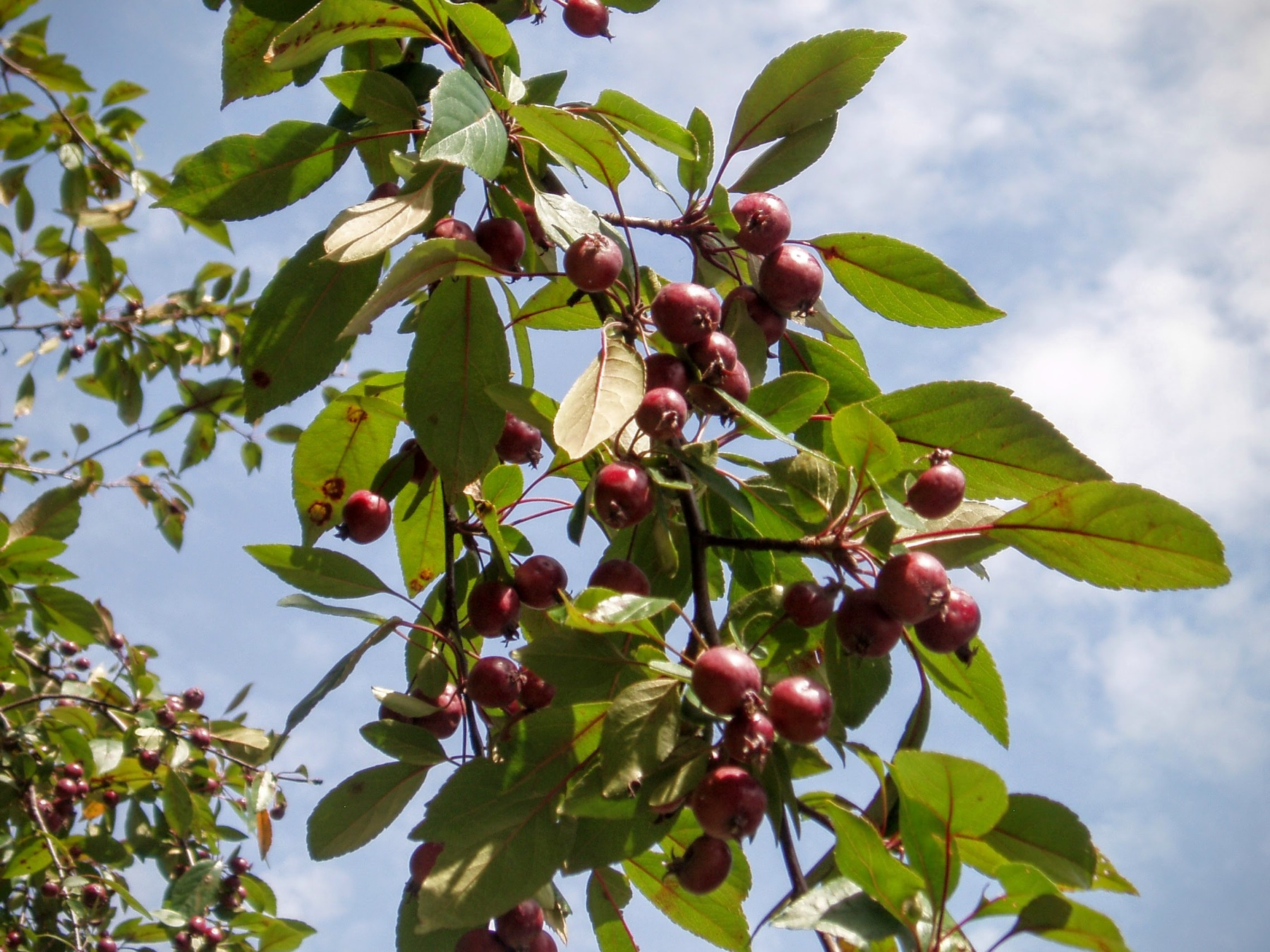 Jabłoń purpurowa